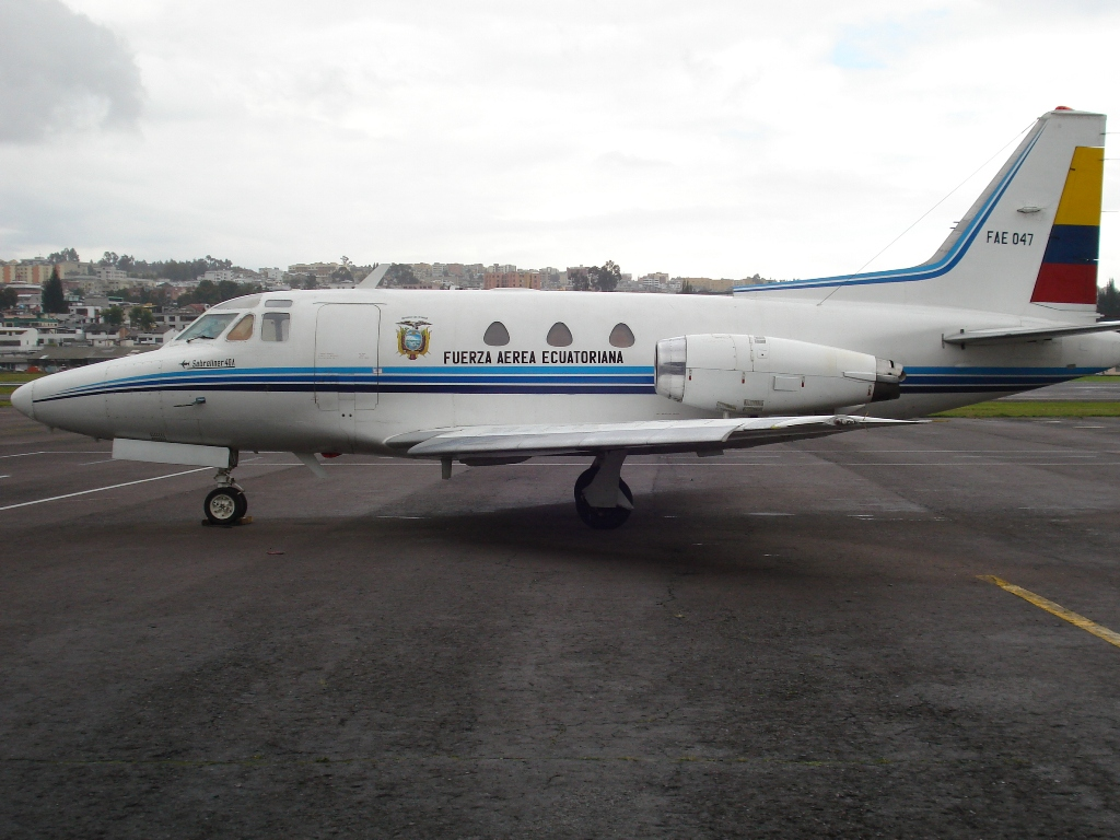 Sabreliner